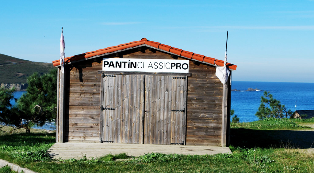 Praia de Pantín en Valdoviño